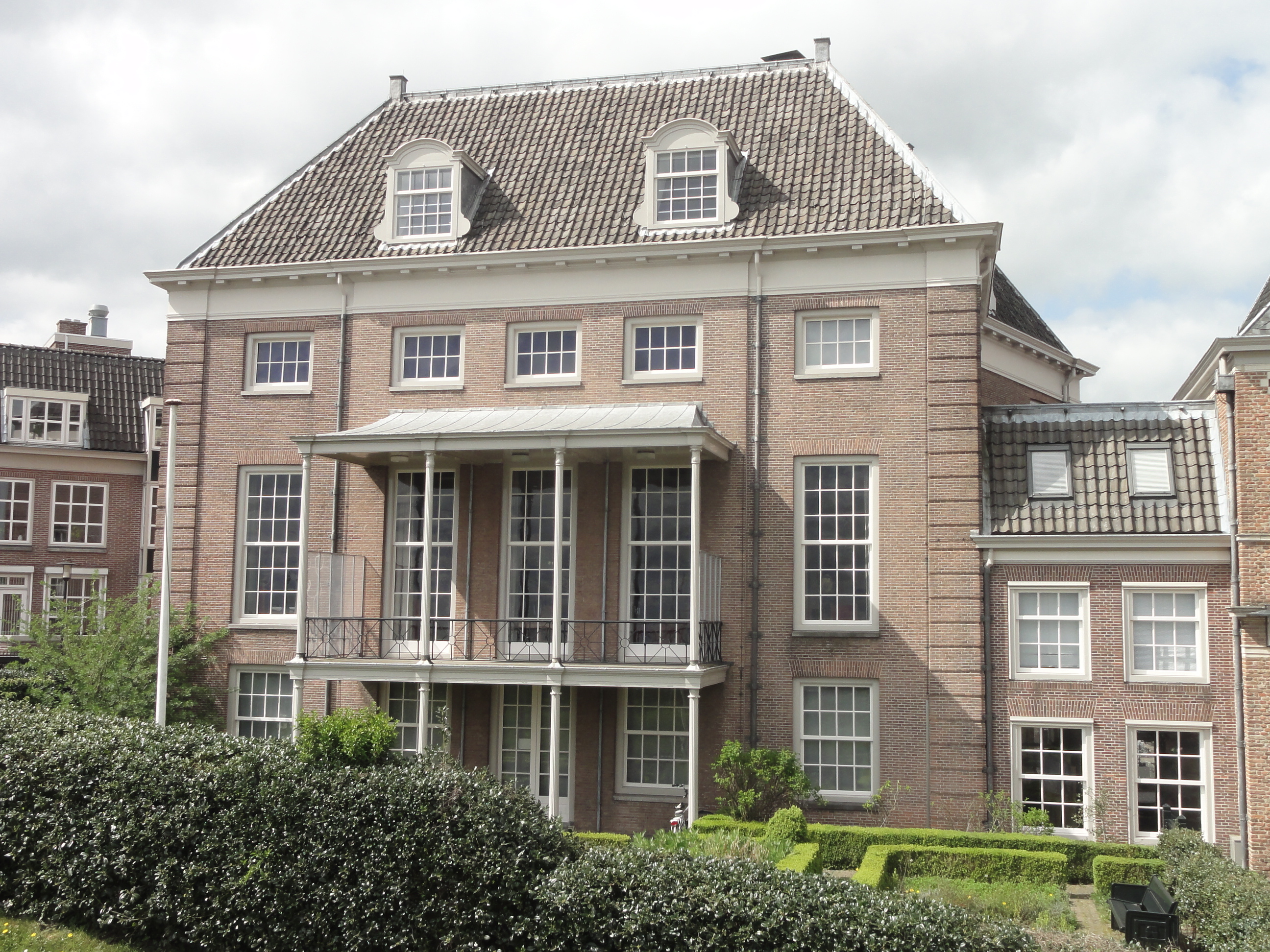 Outside view of a gentleman's club in the Netherlands.